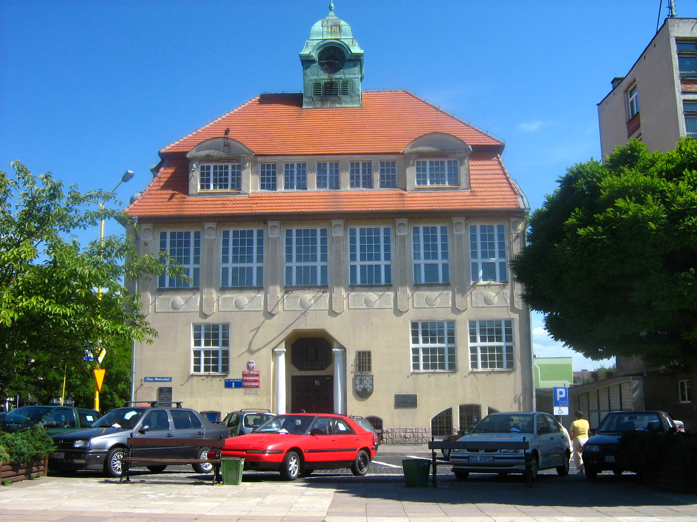 Ratusz w Nowogardzie